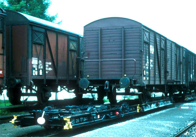 Rolwagens van de Österreichische Bundesbahnen beladen met NS goederenwagen van het type GS